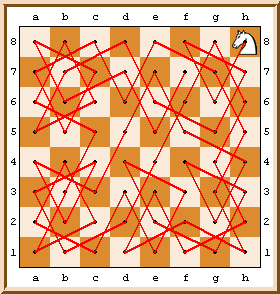 Illustration du problème du cavalier. Il s'agit de faire parcourir au cavalier l'ensemble de l'échiquier en ne passant qu'une fois sur chaque case.